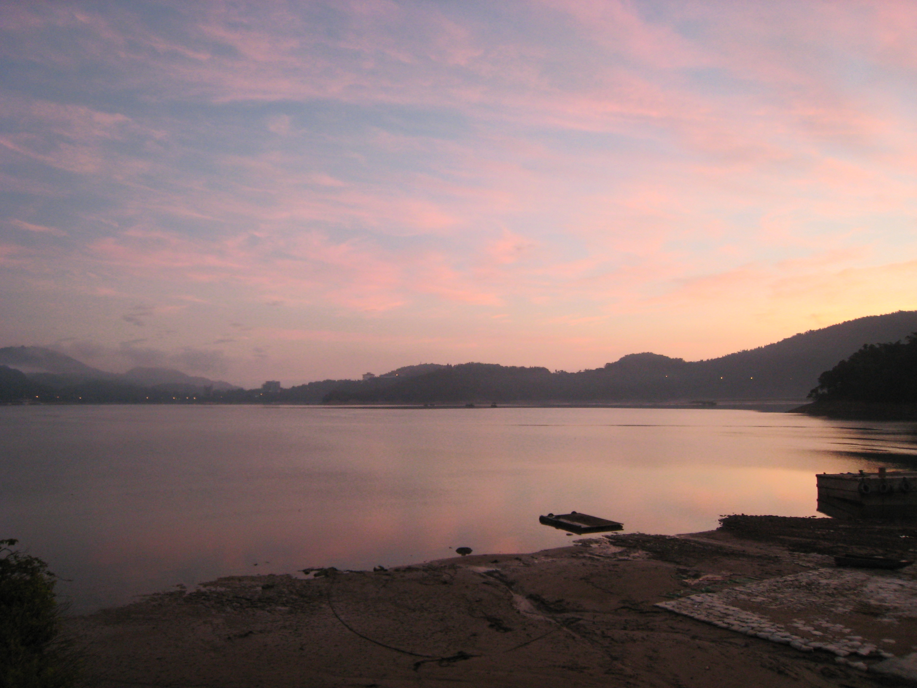 日月潭日出Bân-lâm-gú: Ji̍t-gua̍t-thâm ji̍t-tshut. 日月潭日出。